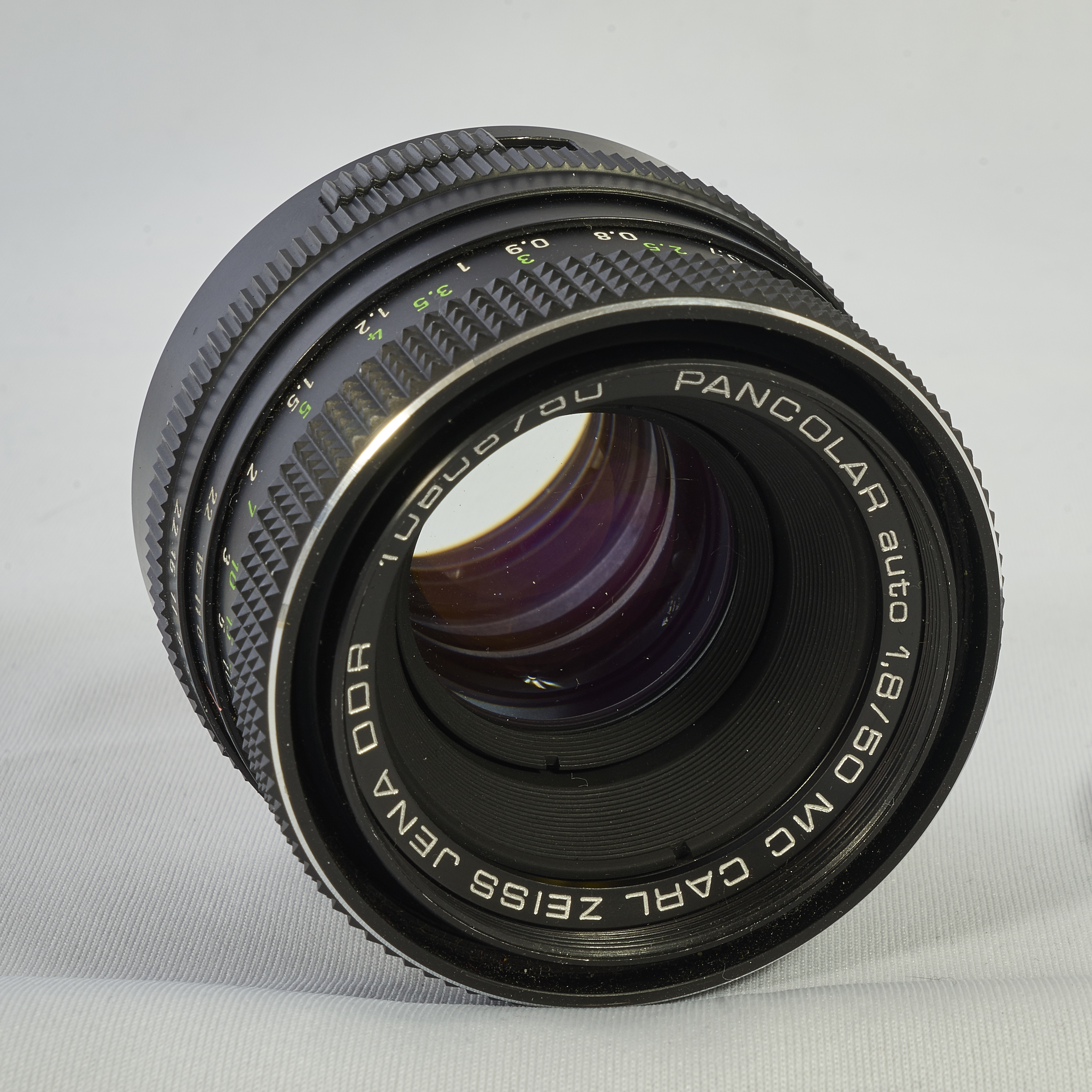 CZJ Pancolar 50mm f1.8